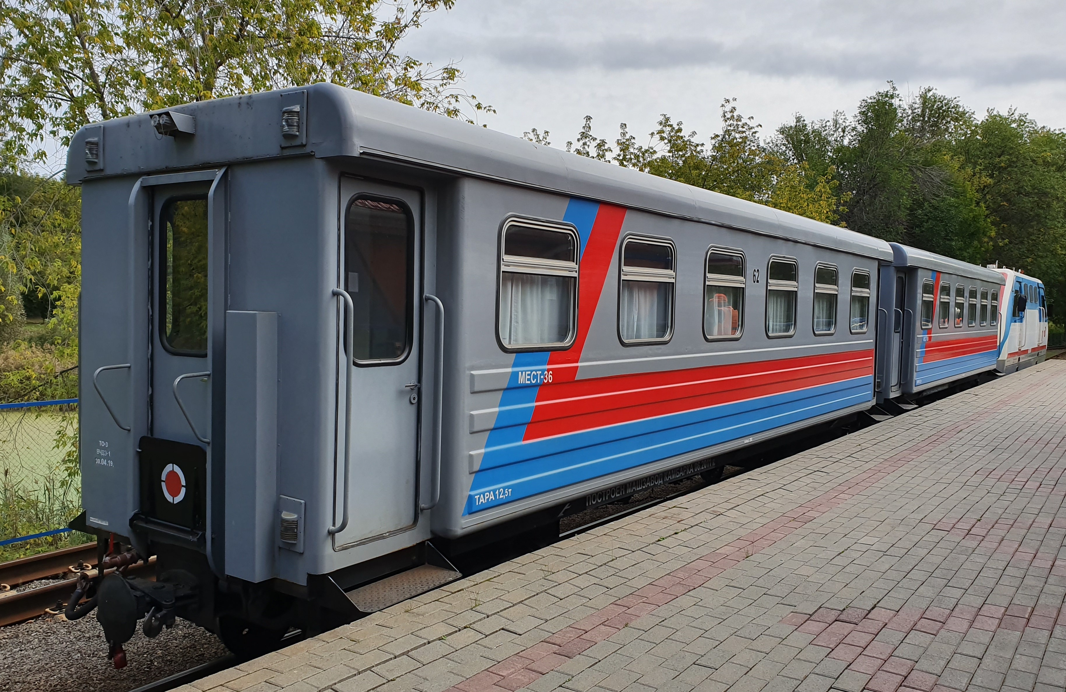 КДЖД Пионерская (перед отправлением)